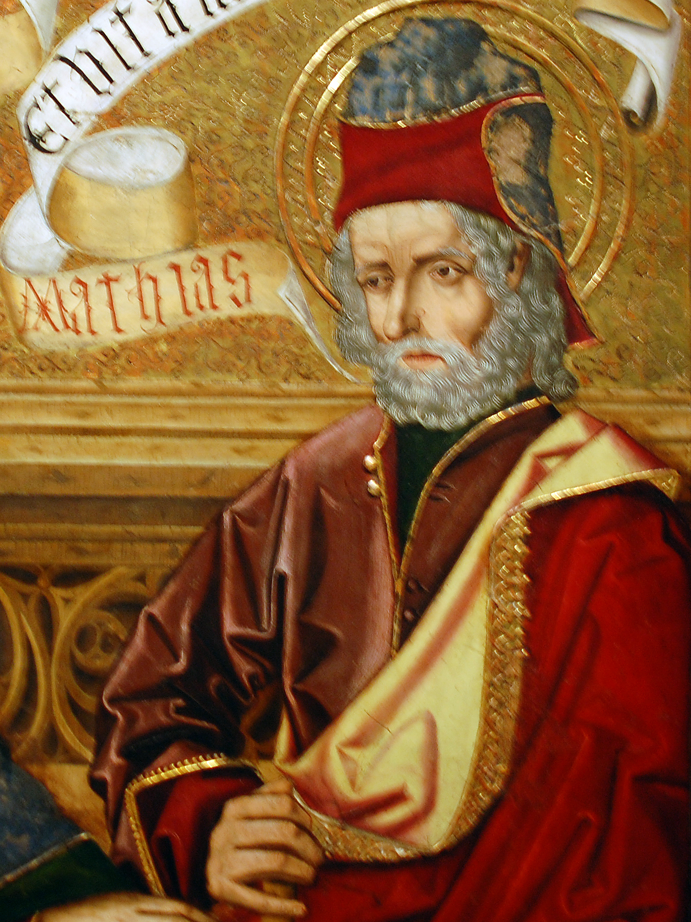 Aragonés: Sant Matías